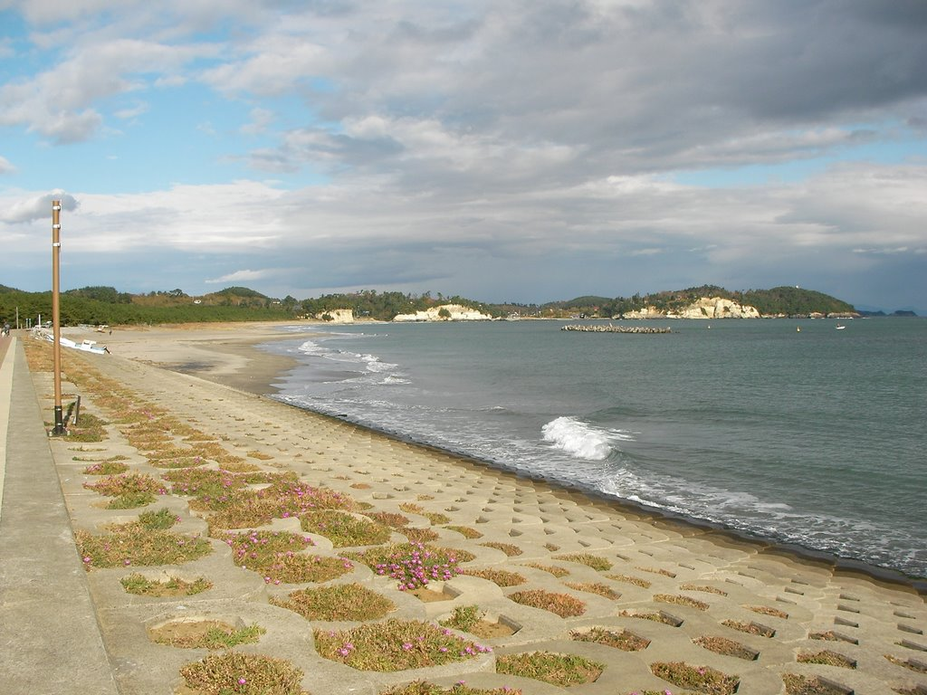 菖蒲田海水浴場